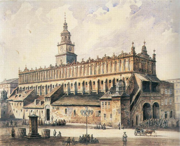 Sukiennice krakowskie przed restauracją Tomasza Prylińskiego, (Aleksander Gryglewski, 1869)